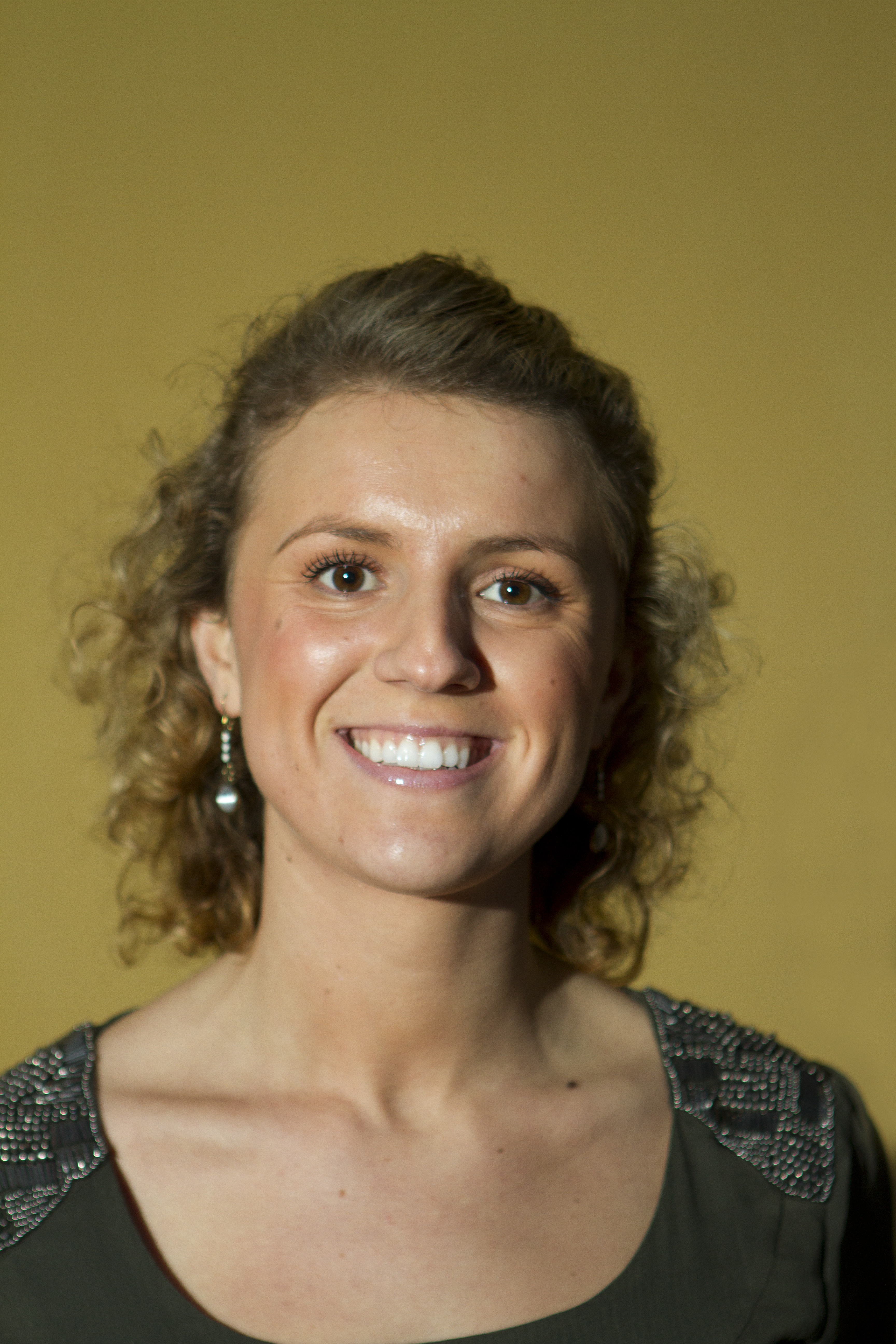 Fatbardhe Hetemaj, 31 lokakuuta 2010